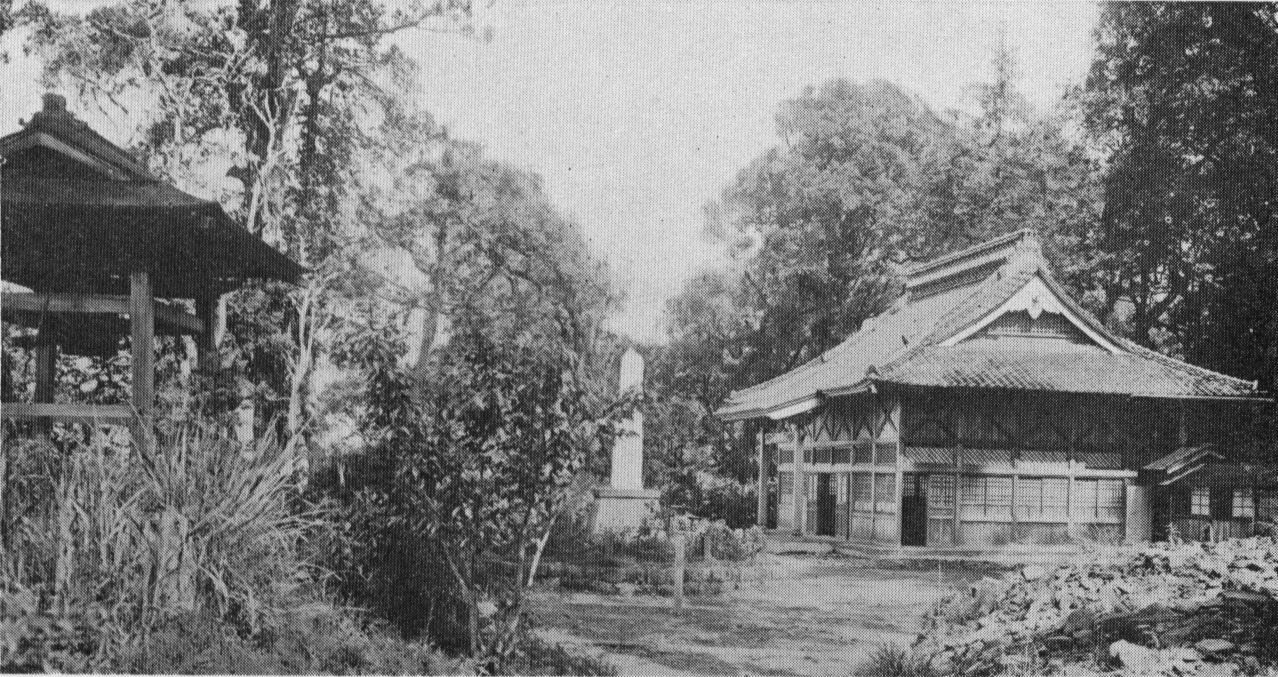 中文（台灣）: 作者：勝山吉作。阿里山寺。典藏者：中央研究院數位物件典藏者：中央研究院數位文化中心。公眾領域標章（Public Domain Mark）。發佈於《開放博物館》